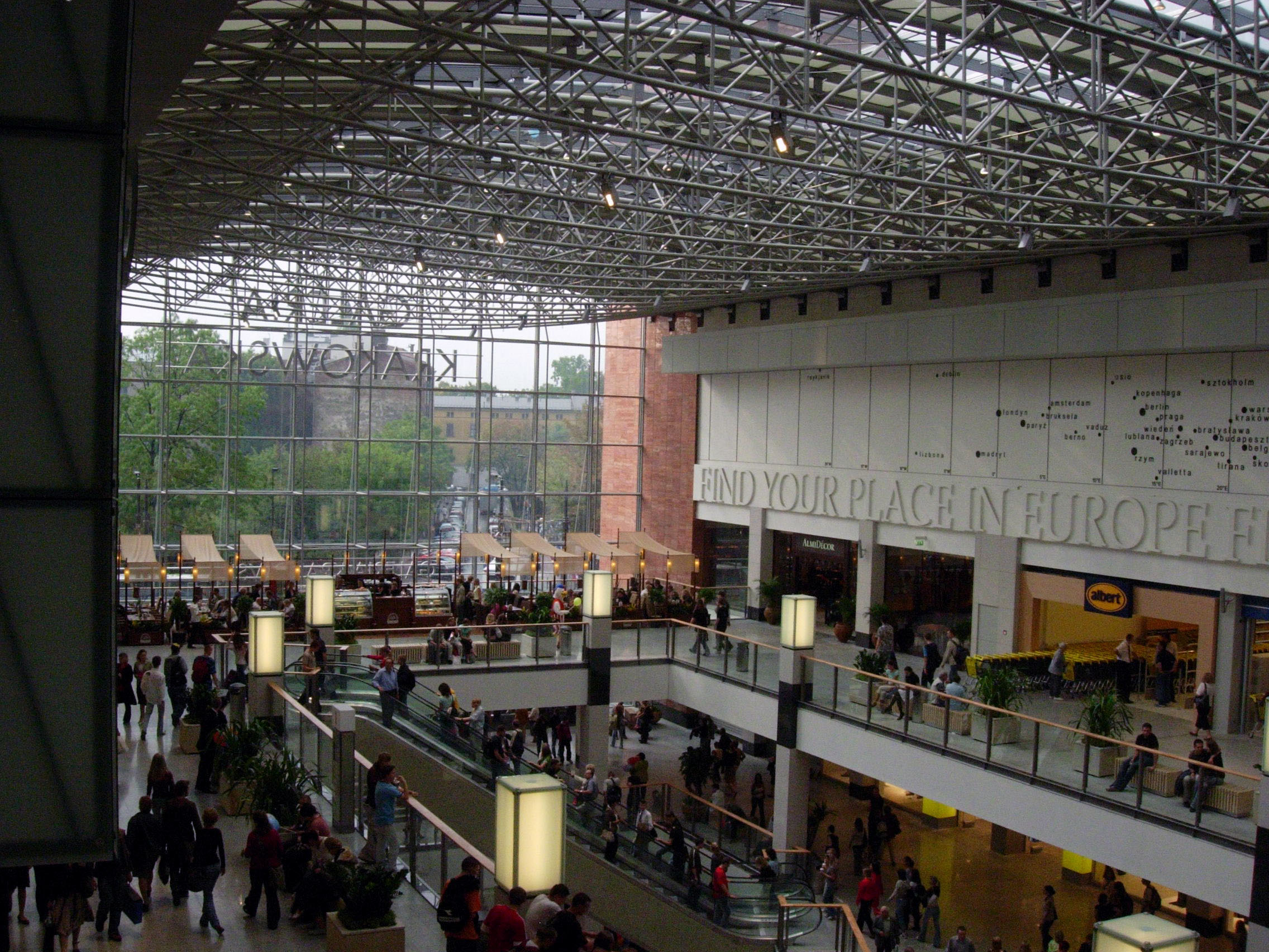 Hala europejska, Galeria Krakowska